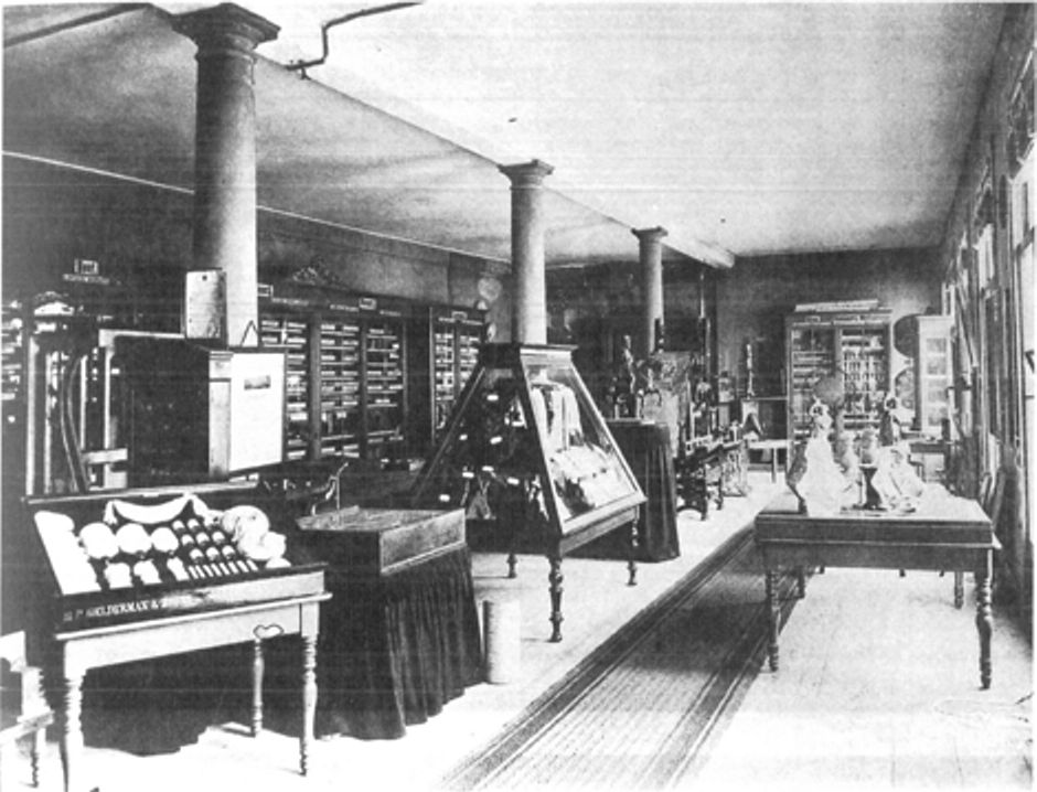 Verzameling van produkten van mechanische bedrijven in Polytechnische School te Delft